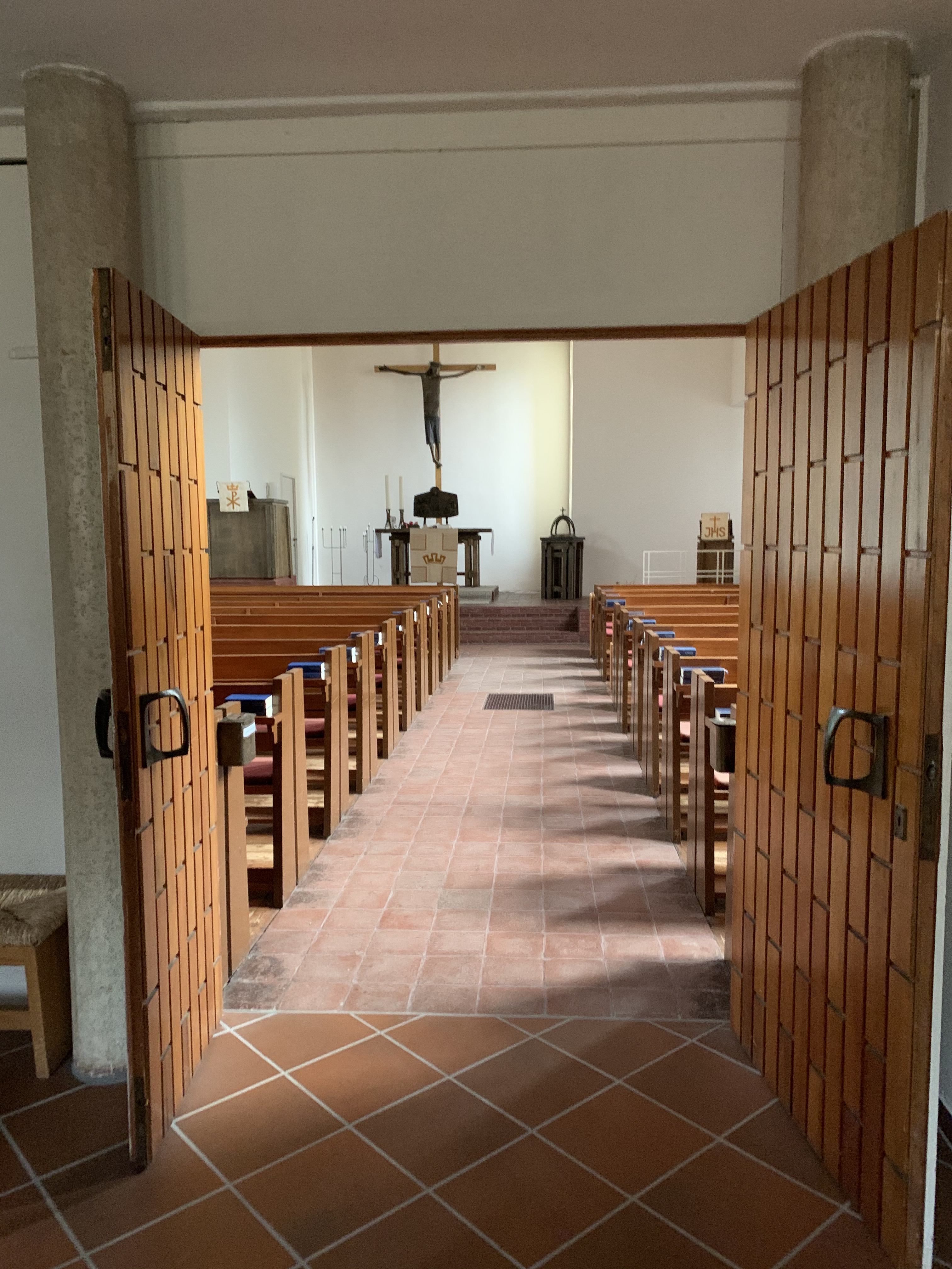 Die St.-Petri-Kirche (Neu Darchau) von Innen.